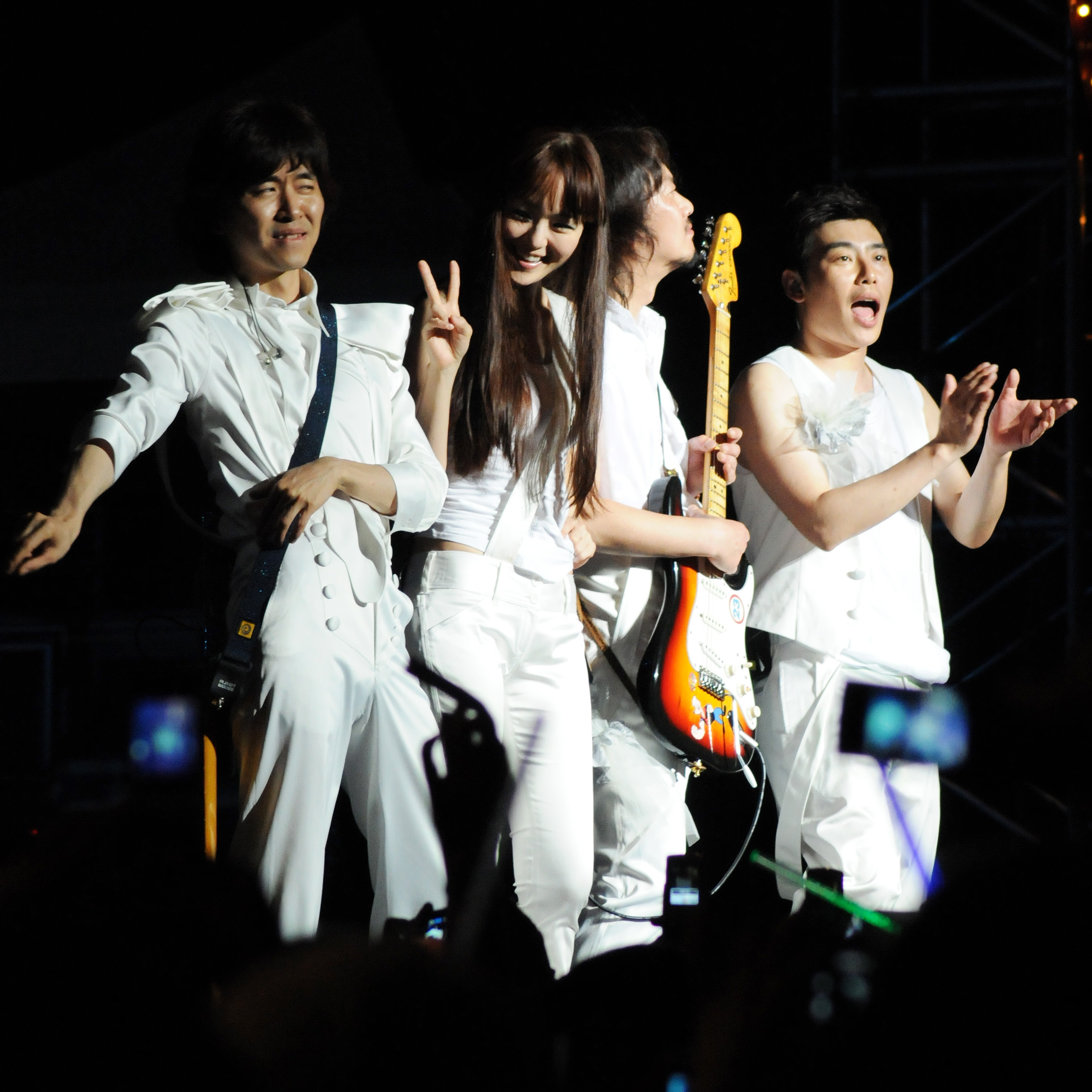 Jaurim Jul 5, 2008 at 20:54, KOREA Seoul